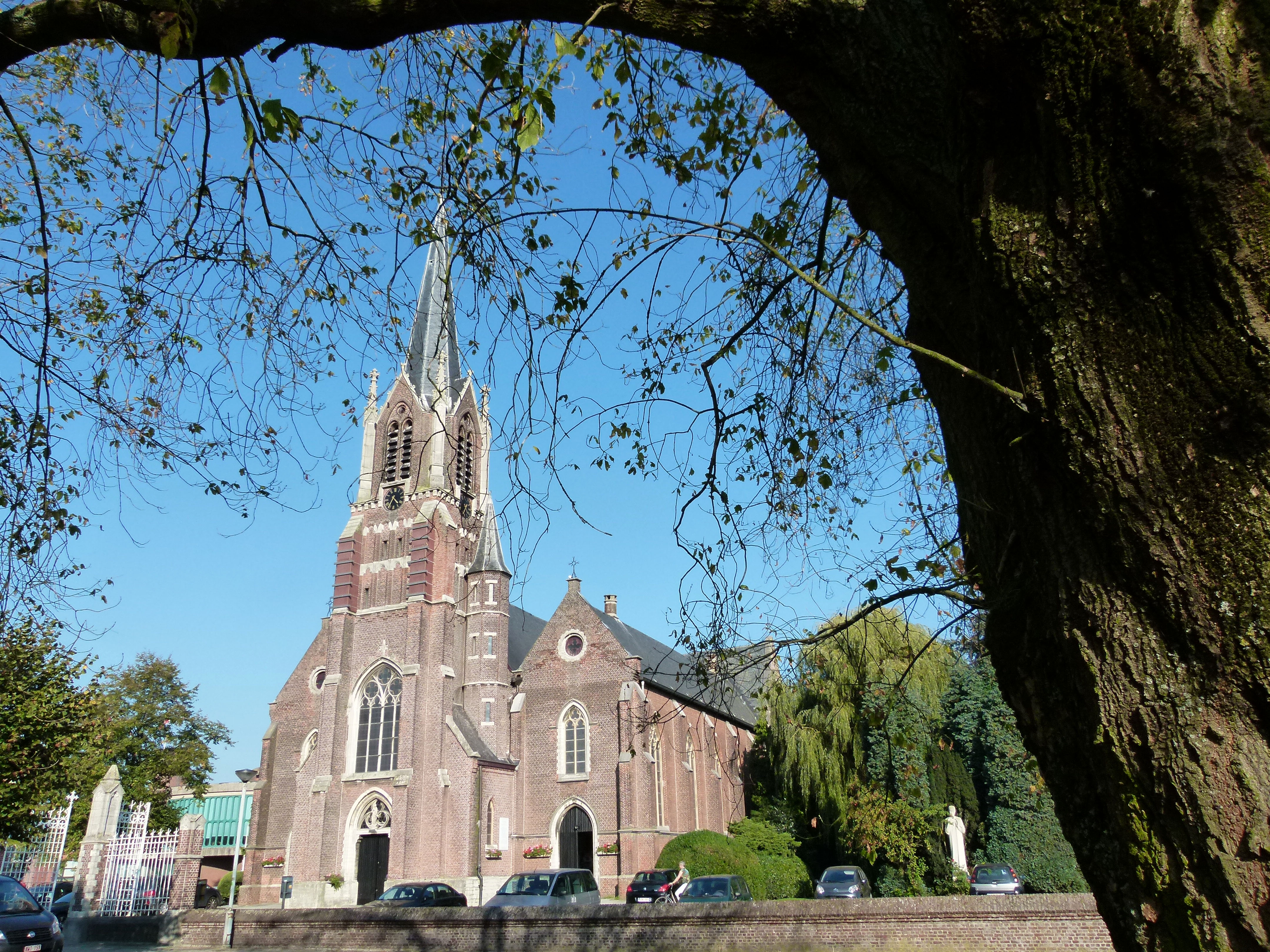 Parochiekerk van Sint-Cordula Vrijstaand gebouw gelegen temidden van het voormalige kerkhof dat oorspronkelijk de hele oppervlakte tussen de Verbertstraat (west), Jozef Van Craenstraat (Z.), ongeveer de huidige Schotenvaart (oost), en de Venstraat (noord) besloeg. In 1882 werd de eigenlijke begraafplaats rond de kerk afgesloten met traliewerk; het lage muurtje met toegangspoort en ijzeren hek tgov. de ingang van de kerk herinnert hieraan. In 1928 werd de begraafplaats ten Z.O. van het Cordulaplein ingericht en de open ruimte rond de kerk beplant. Aan de Z.-zijde werd een witstenen Heilig Hart beeld door L. Vleeshouwers geplaatst, achter het koor een beeldengroep voor de gesneuvelden van de Eerste Wereldoorlog door J. Strijmans. Bron: Plomteux G., Steyaert R. & Wylleman L. 1985: Inventaris van het cultuurbezit in België, Architectuur, Provincie Antwerpen, Arrondissement Antwerpen, Bouwen door de eeuwen heen in Vlaanderen 10N3 (Ru-Z), Brussel - Gent. Auteurs: Plomteux, Greet